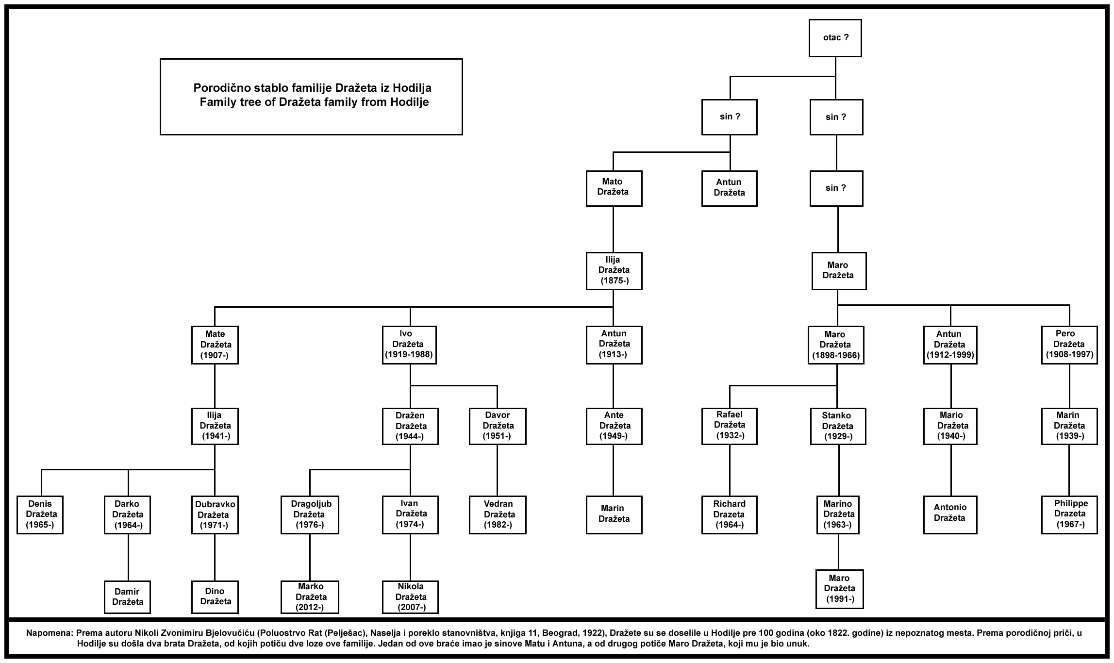 Porodično stablo familije Dražeta iz Hodilja. / Family tree of Dražeta family from Hodilje.